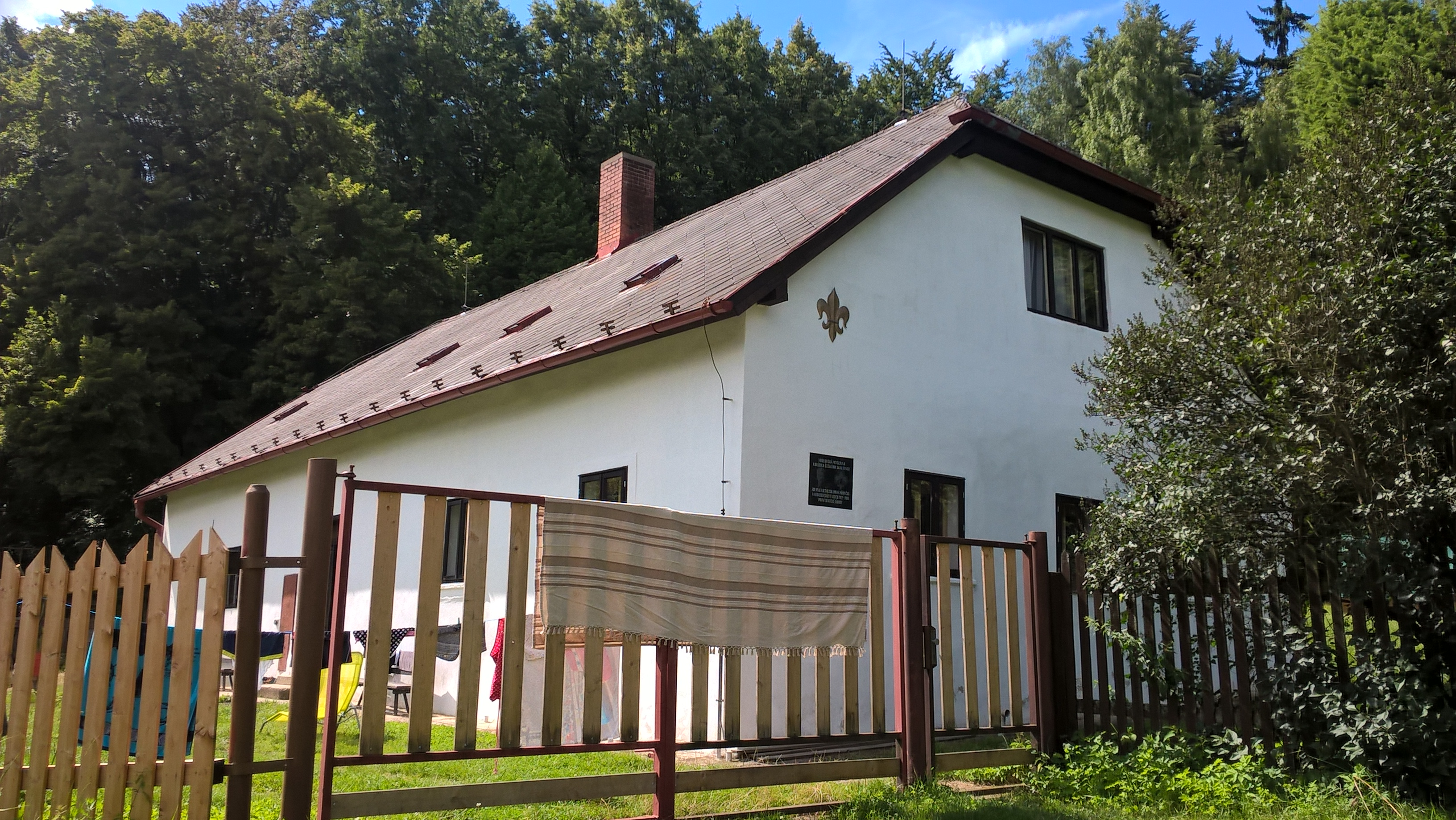 hájenka v Orlovských lesích nad Kejžlicí